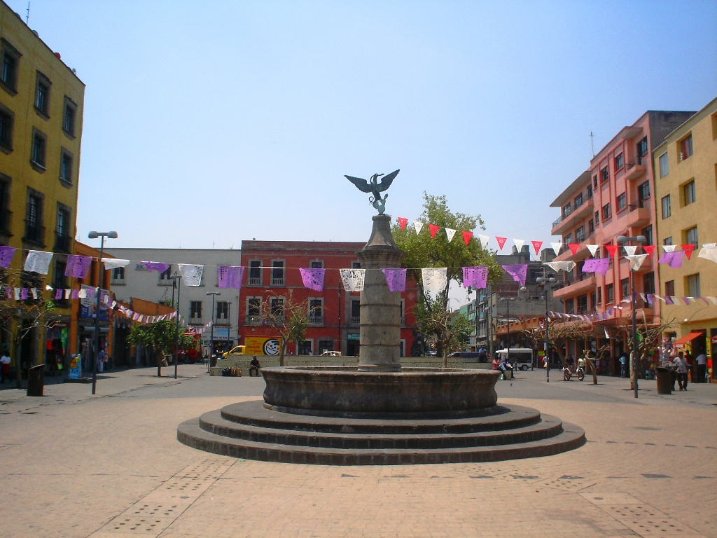 Plaza de la Aguilita en el Barrio de la Merced, Ciudad de Mexico